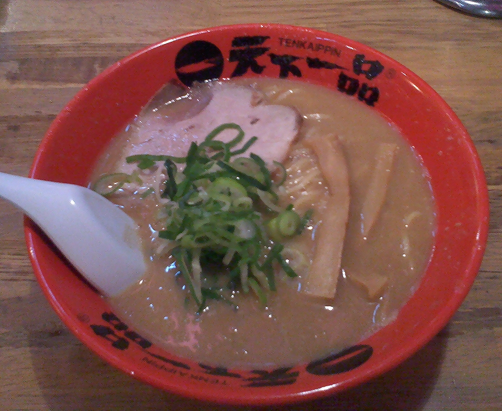 天下一品本店のこってりラーメンにんにく入り